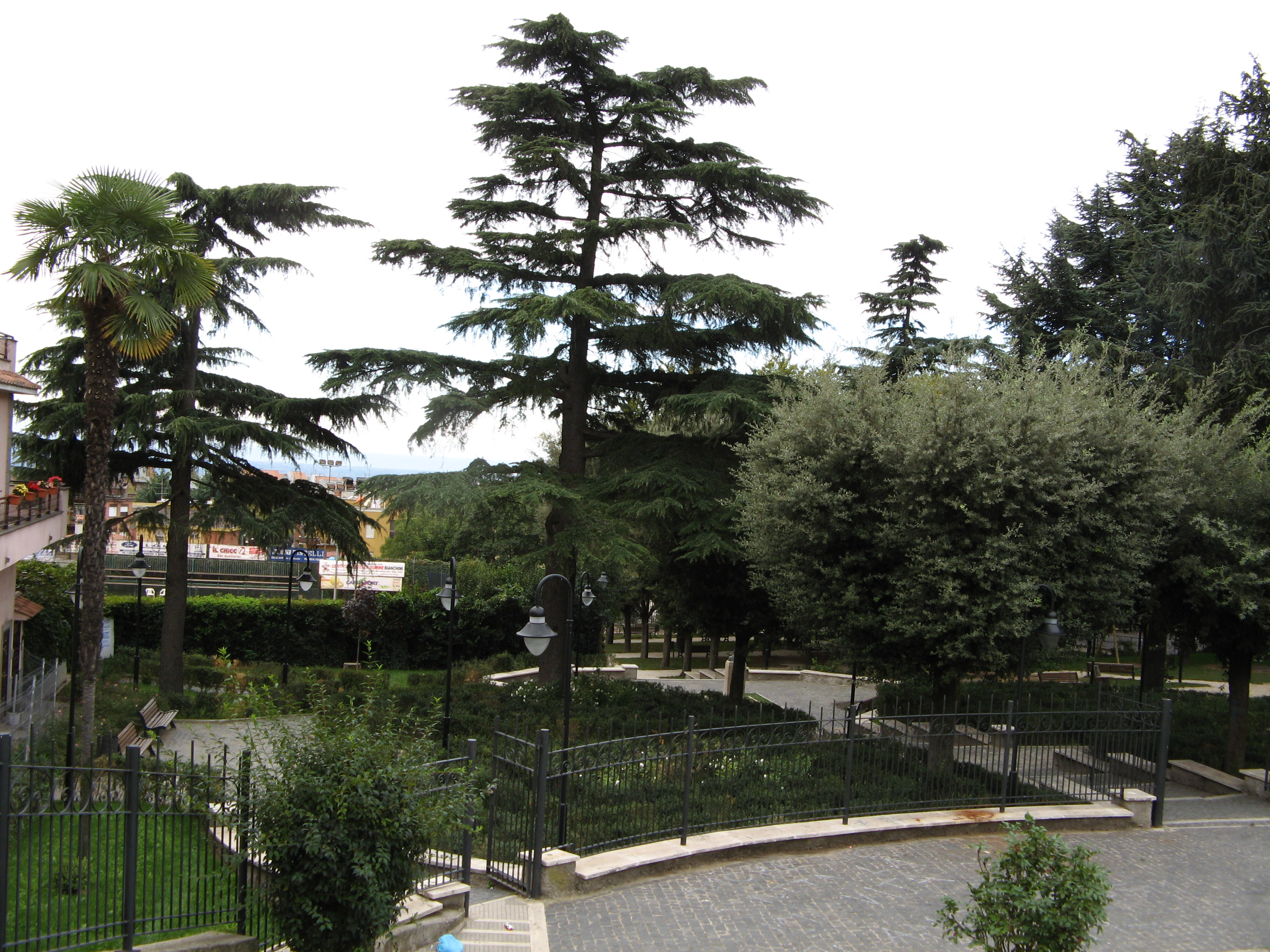 Genzano di Roma: Parco Togliatti